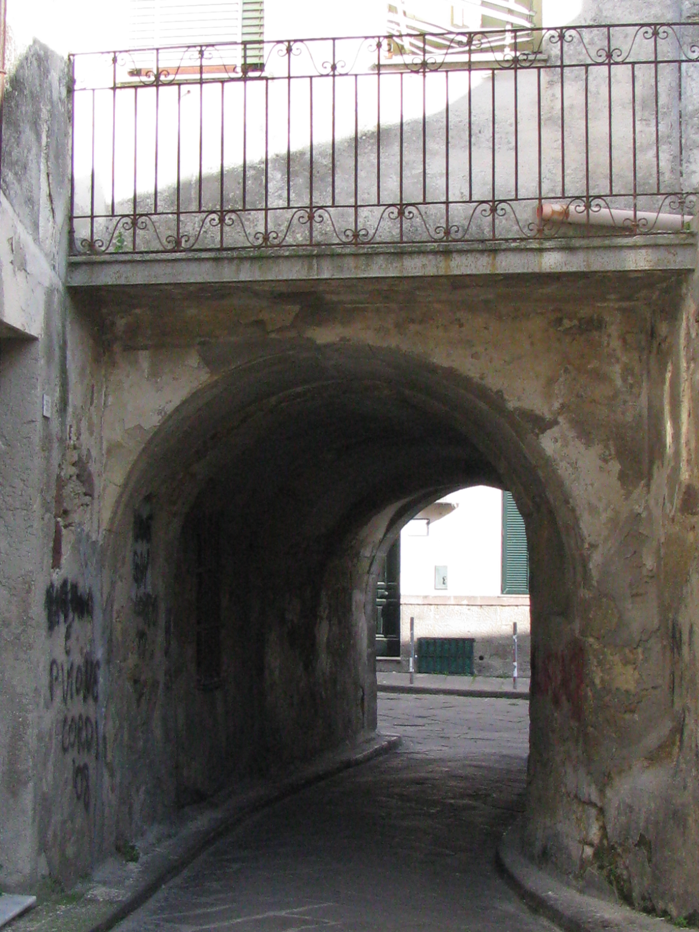 S' Arcu Centro Storico.